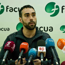 Rubén Sánchez, portavoz de FACUA, durante una rueda de prensa en 2010.